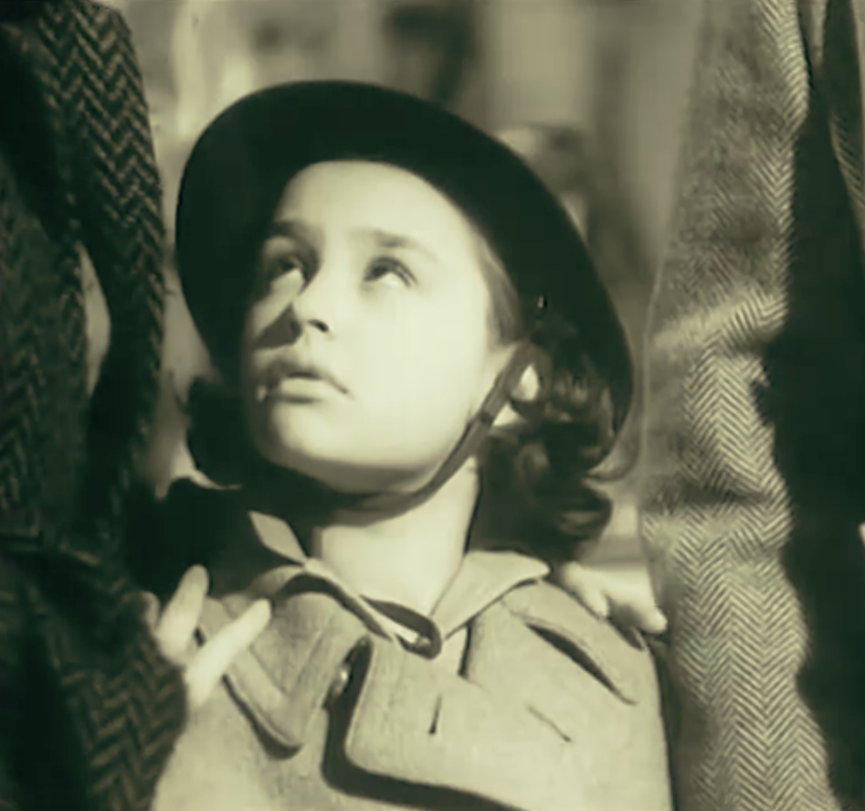 Raffaella Carrà a 9 anni in Tormento del passato (1952)